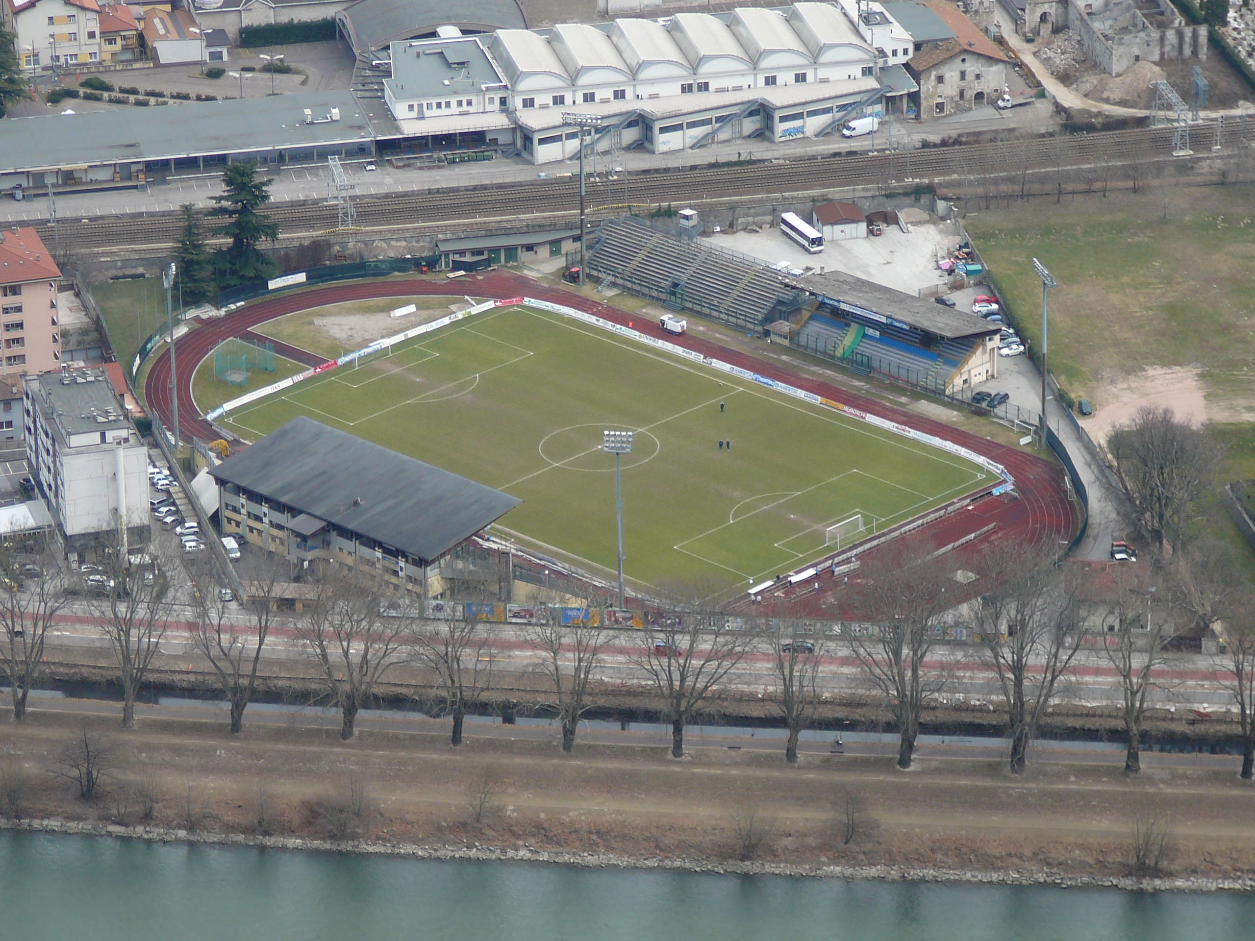 Lo stadio Briamasco a Trento